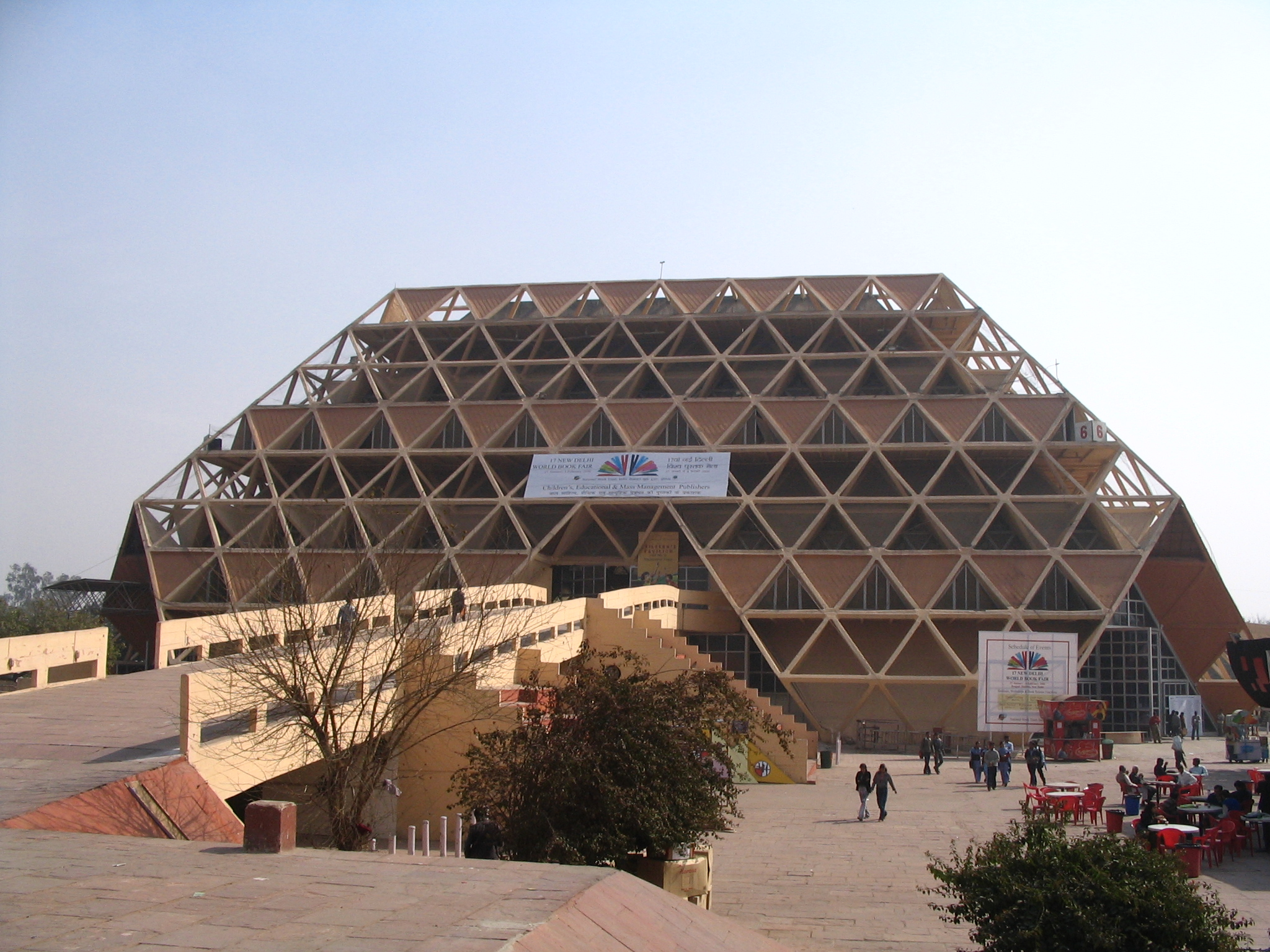 Hall no 6 in Pragati Maidan, New Delhi, India